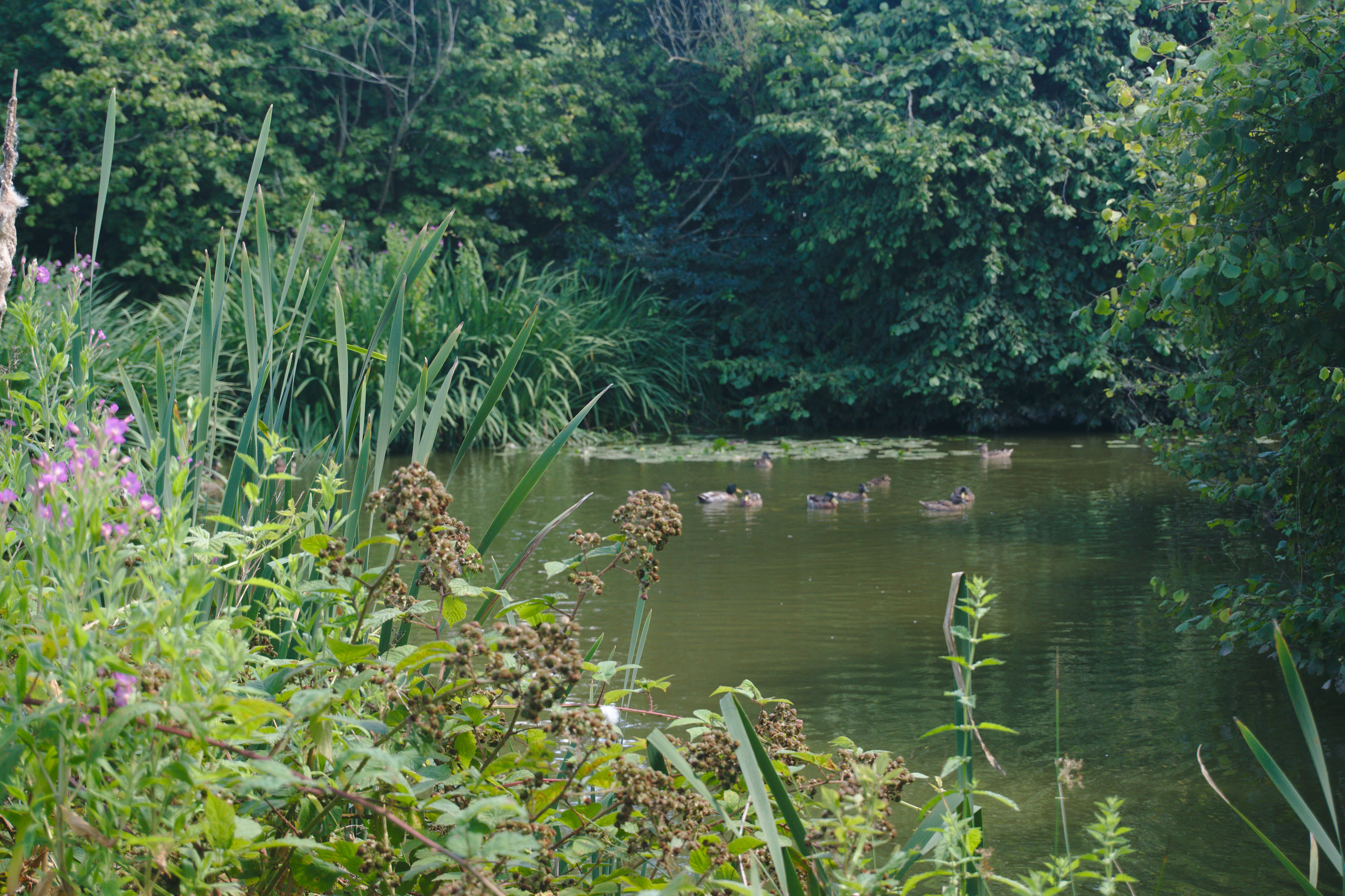 site de la Motte Féodale,Gonfreville-Caillot,Seine-Maritime,Haute-Normandie,France